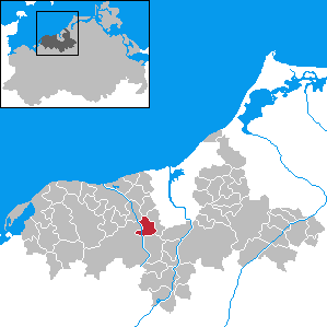 Stäbelow in Mecklenburg-Western Pomerania - District Bad Doberan